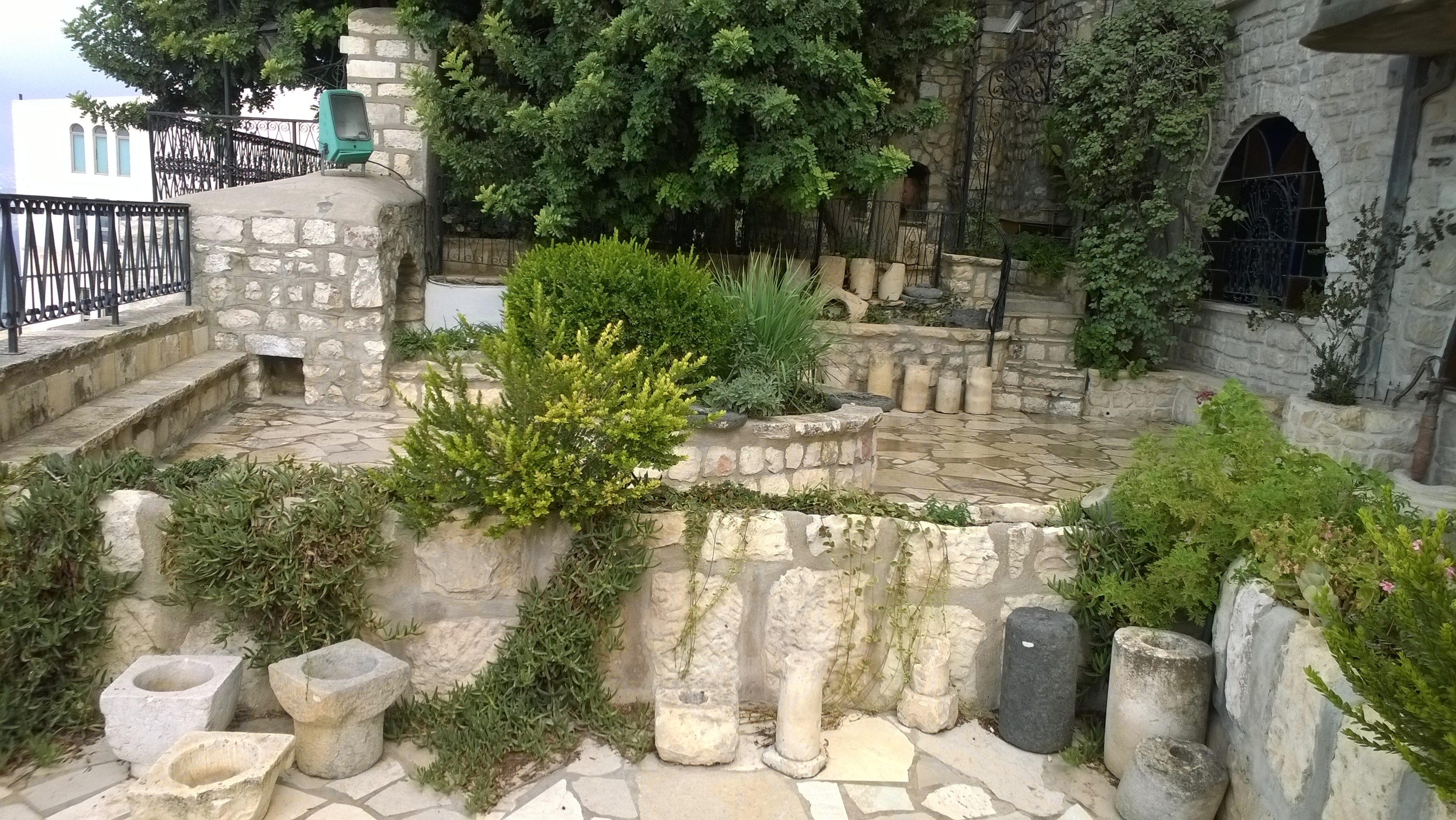 מוזיאון בית המאירי הוא מוזיאון היסטורי המתעד את קורות היישוב היהודי בצפת מן המאה ה-19 ועד שנת 1948.